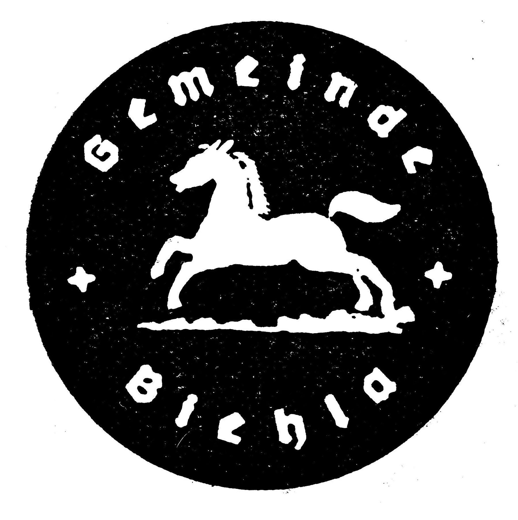 Altes Dorfsiegel von Biehla aus dem 19./ 20. Jahrhundert.